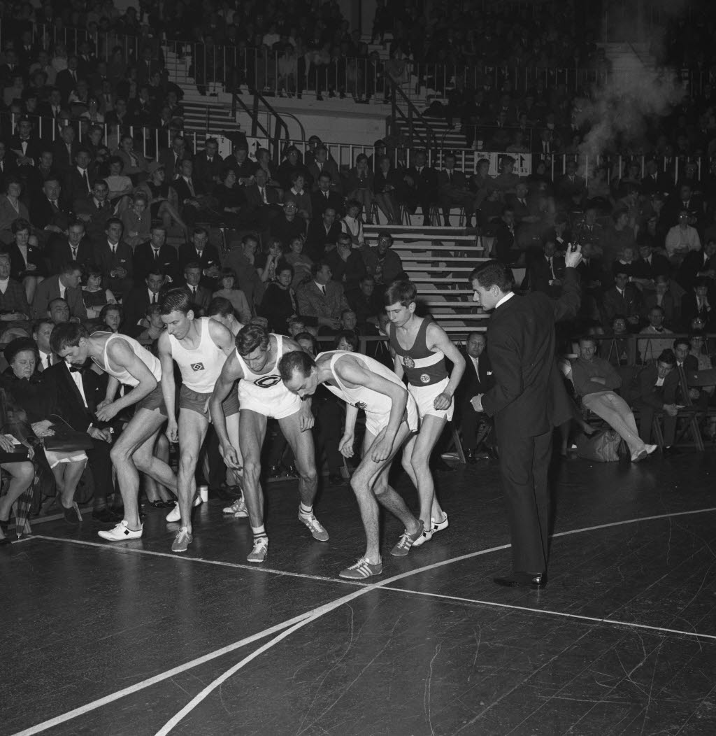 1.000-Meter-Lauf der Männer. Im Bild u.a. Läufer Harald Norpoth (2.v.r.) und Europameister Bodo Tümmler (3.v.r.).